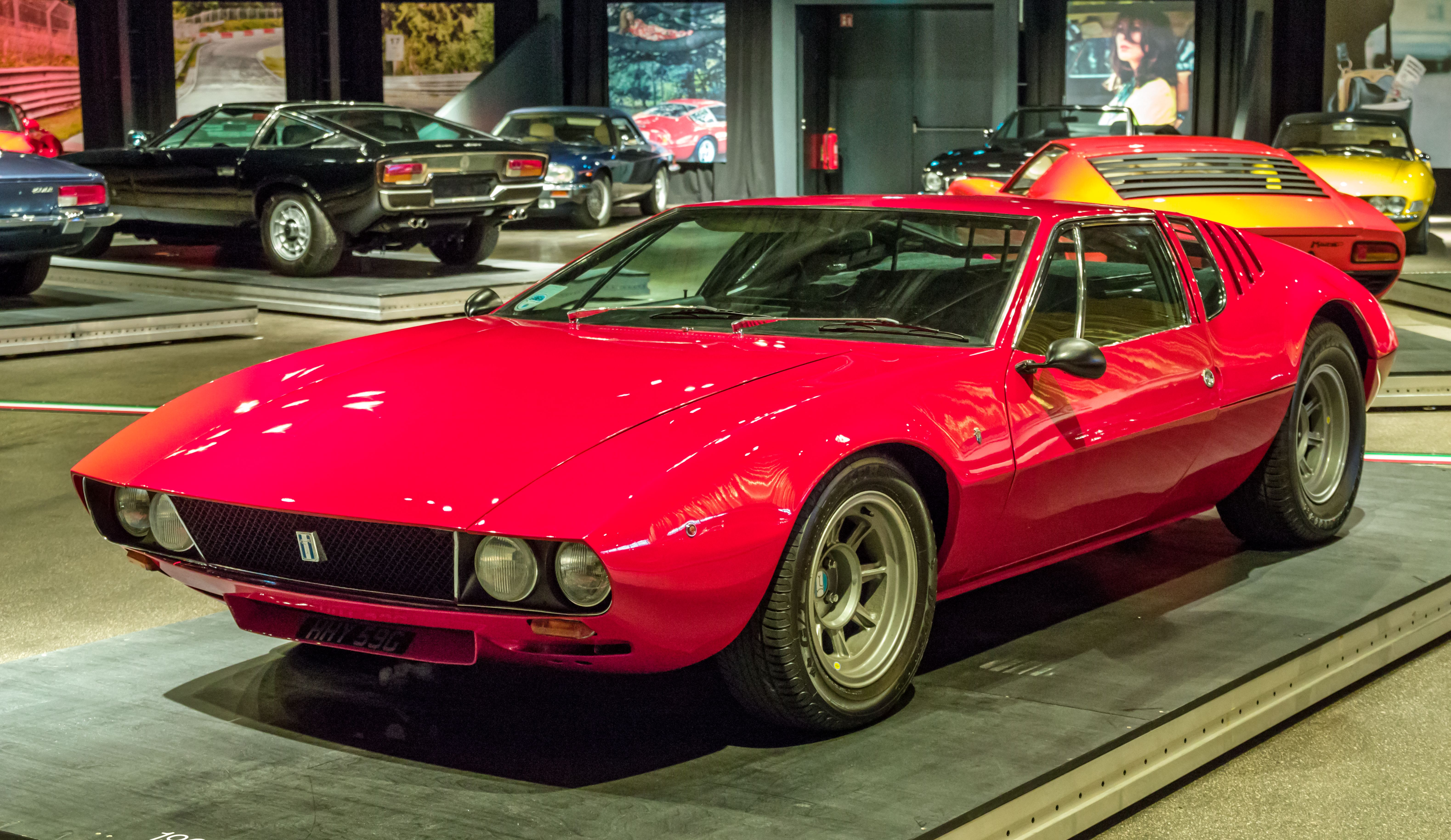 Das Volante Oldtimermuseum in Kirchzarten